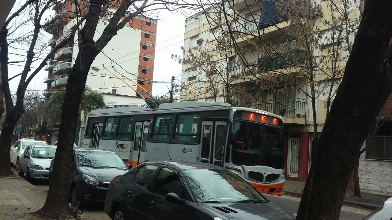 Trolebus de la linea K en la Ciudad de Rosario, Argentina